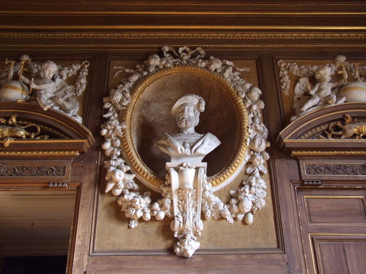 Francois I Gallery, Château de Fontainebleau, France